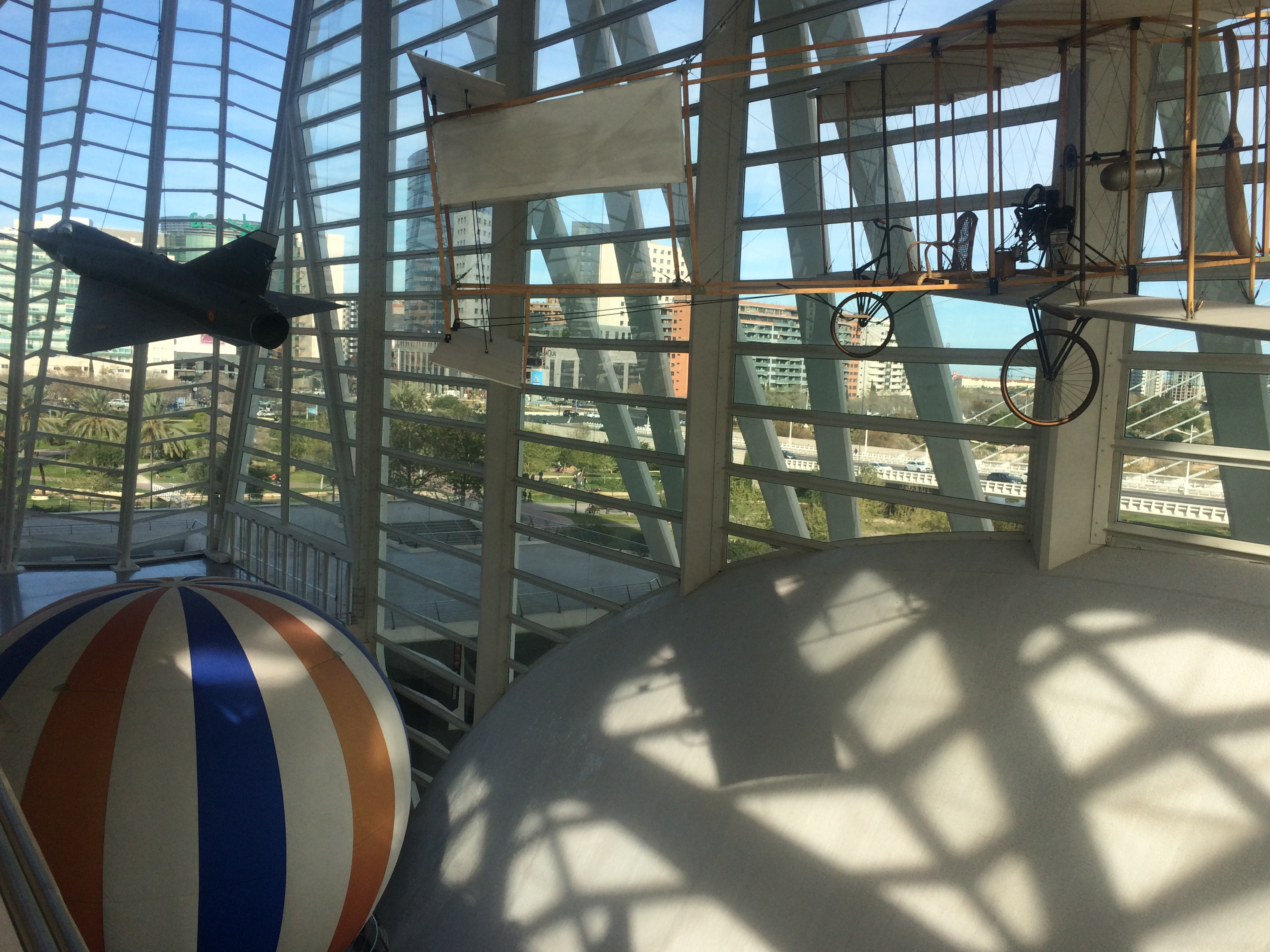 exposition de l'évolution du transport "aérien"